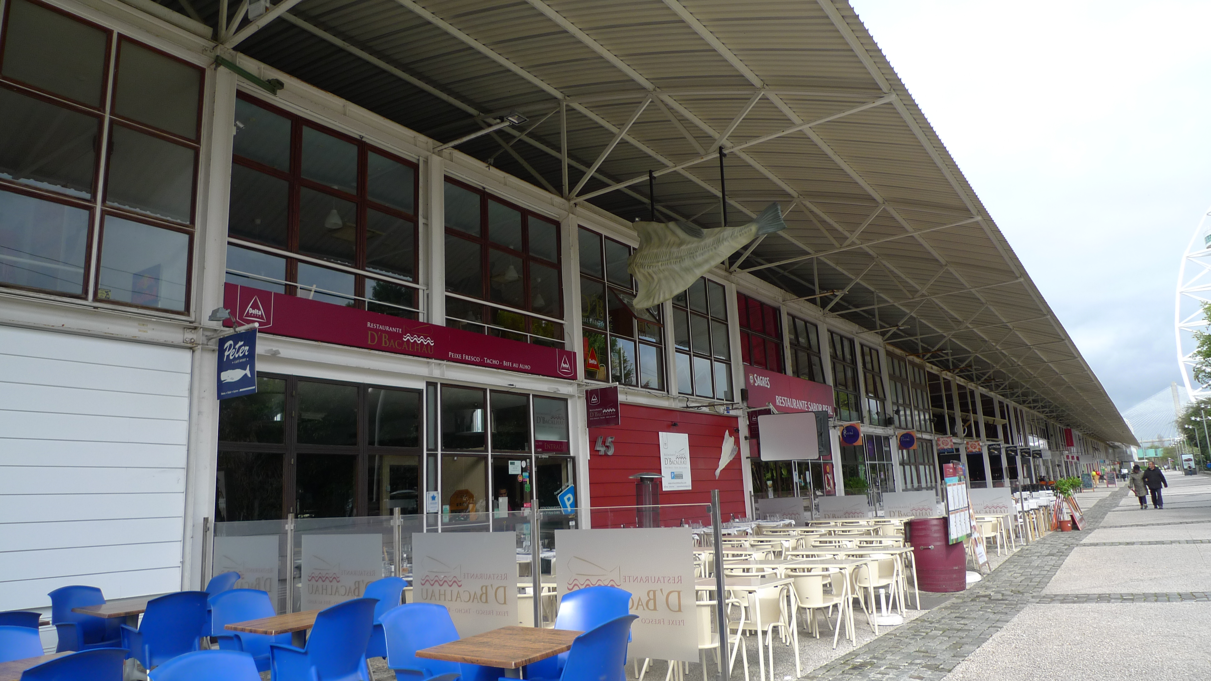 L1190820